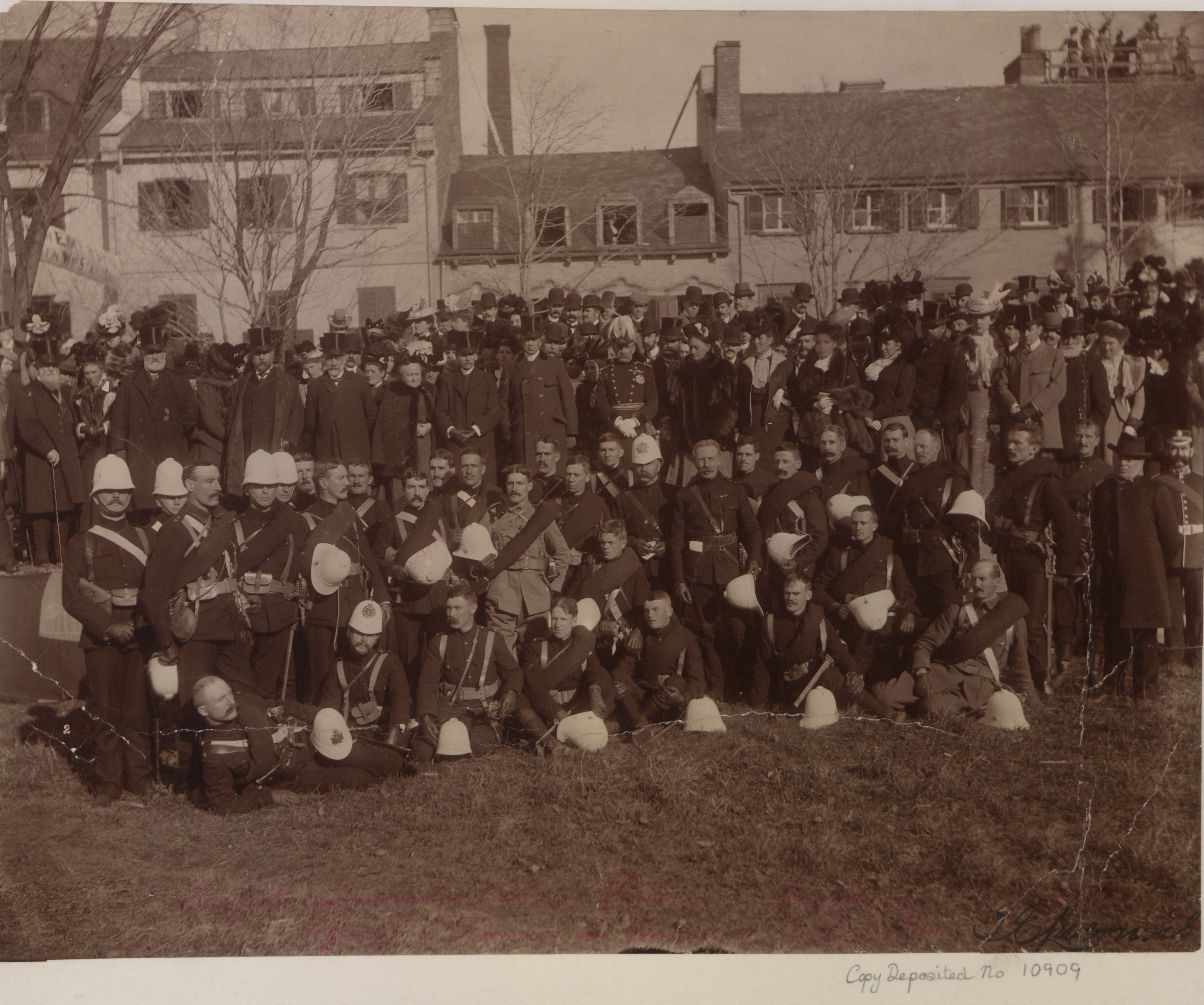 Groupe des officiers du Contingent Canadien.